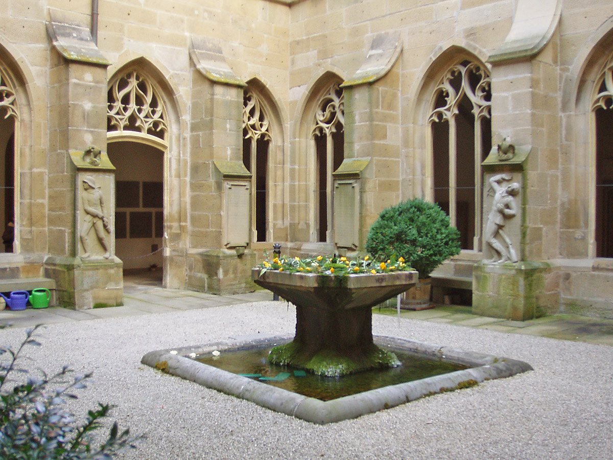 Kreuzgang der Stiftskirche in Öhringen